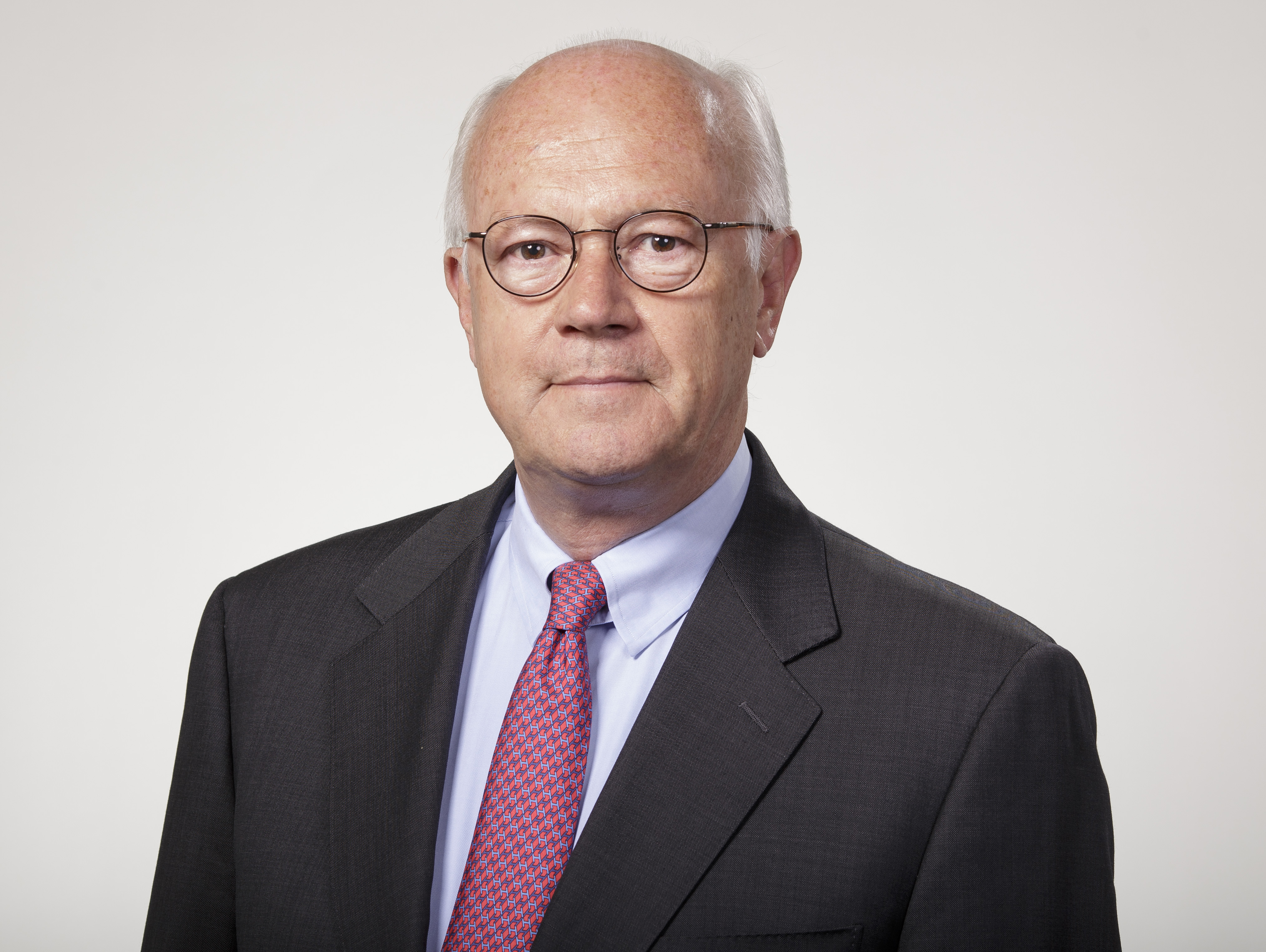 Hans-Peter Uhl, Bundestagsabgeordneter